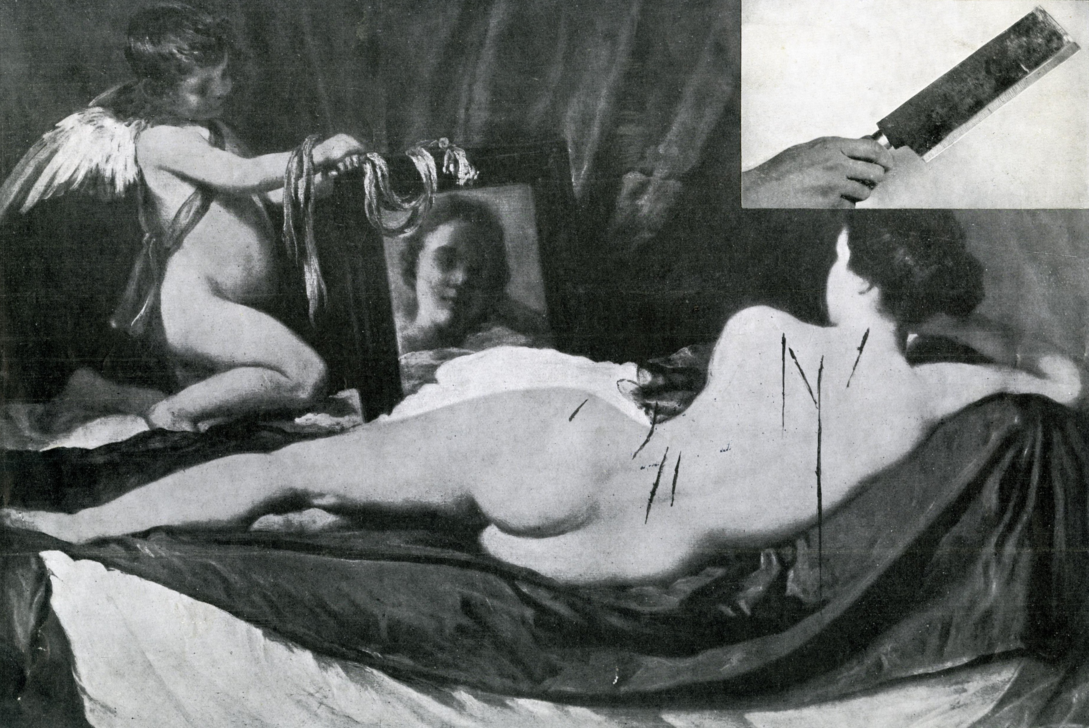 Vrouwenemancipatie. Schilderij : ' Venus met spiegel' geschilderd door Velasquez wordt in 1914 door een Engelse suffragette met een bijl beschadigd tijdens een tentoonstelling in the National Gallery in Londen. Inzet rechts: de betreffende bijl. Pagina uit tijdschrift 1914.